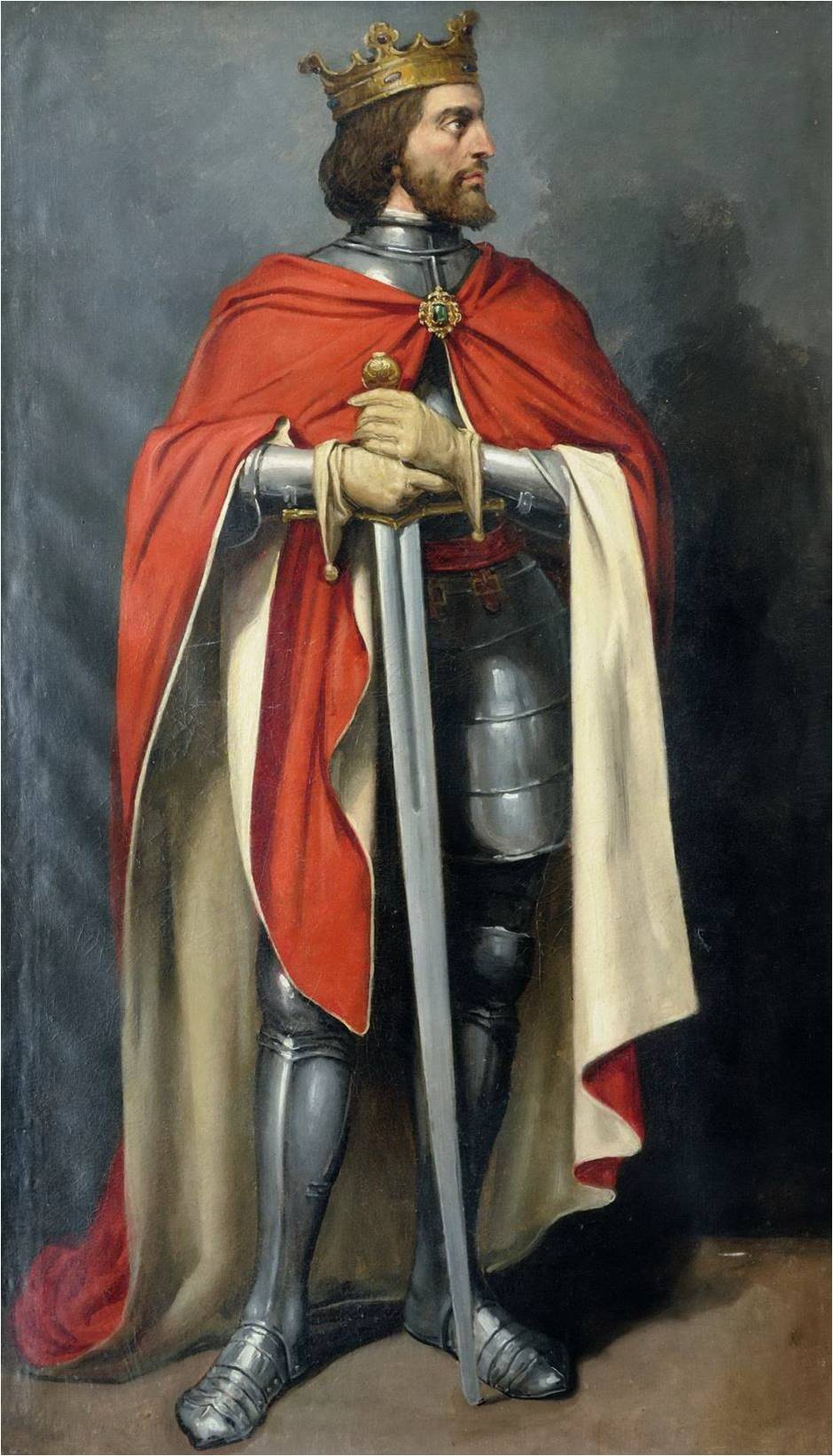 Retrato imaginario del rey Alfonso XI de Castilla (1311-1350). Fue hijo del rey Fernando IV de Castilla y de la reina Constanza de Portugal. En 1340 derrotó a los musulmanes en la batalla del Salado y en 1341 conquistó Alcalá la Real, Priego de Córdoba, Carcabuey y Rute. En 1344, tras un asedio de dos años, conquistó la ciudad de Algeciras. Alfonso XI falleció en 1350, victima de la Peste negra, mientras asediaba Gibraltar y fue sucedido en el trono por su hijo, Pedro I de Castilla.